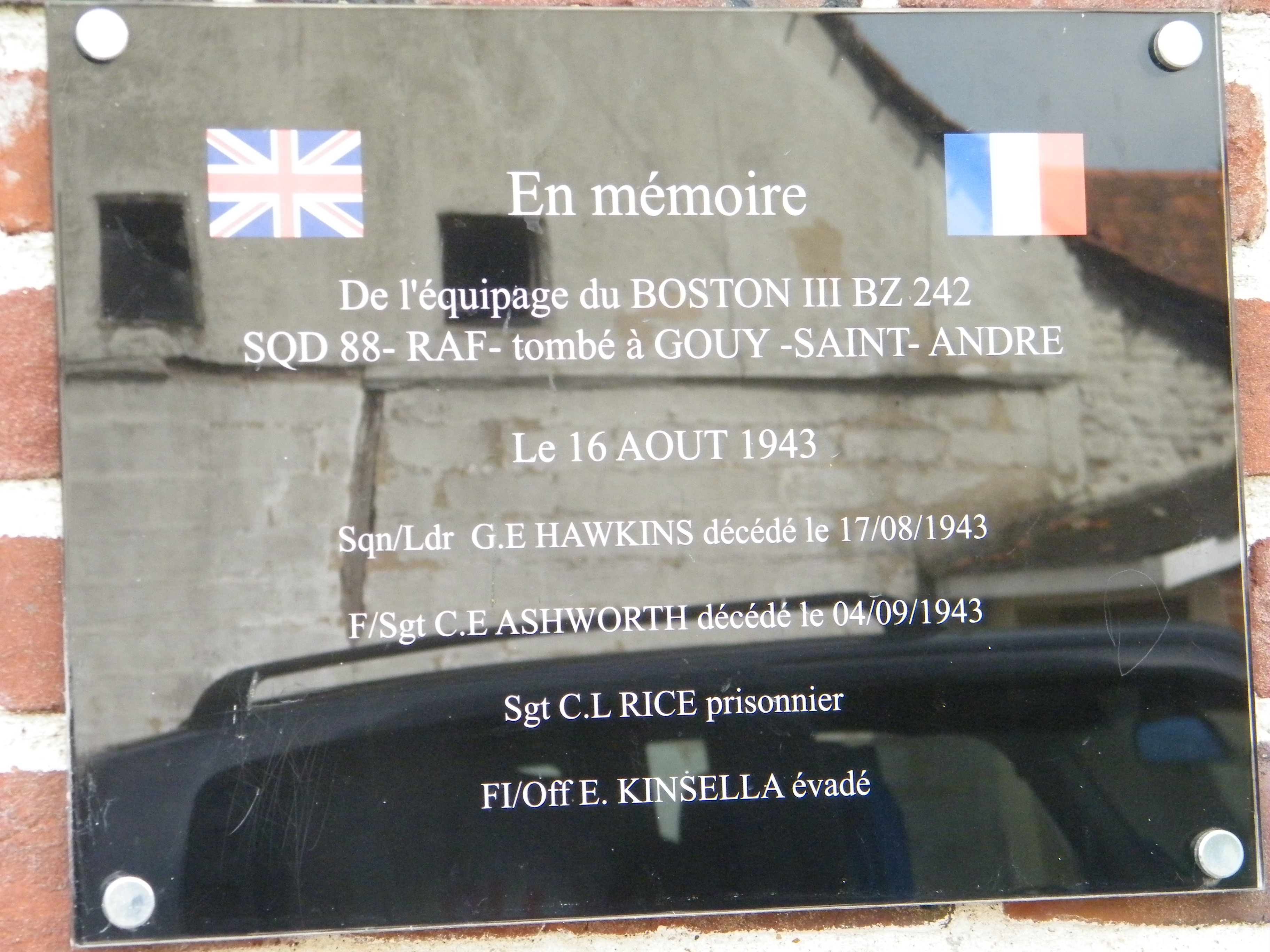 Gouy-Saint-André, Pas-de-Calais, Fr, église